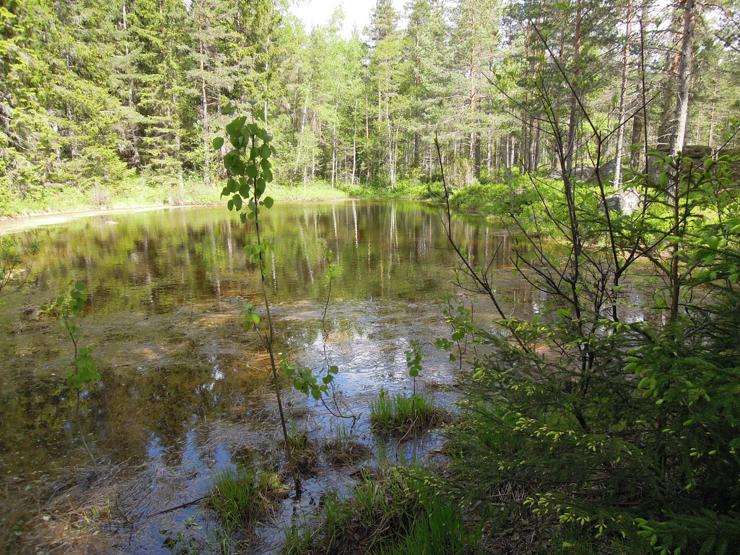 Naturreservatet Skärmarbodabergen, Galtapussen